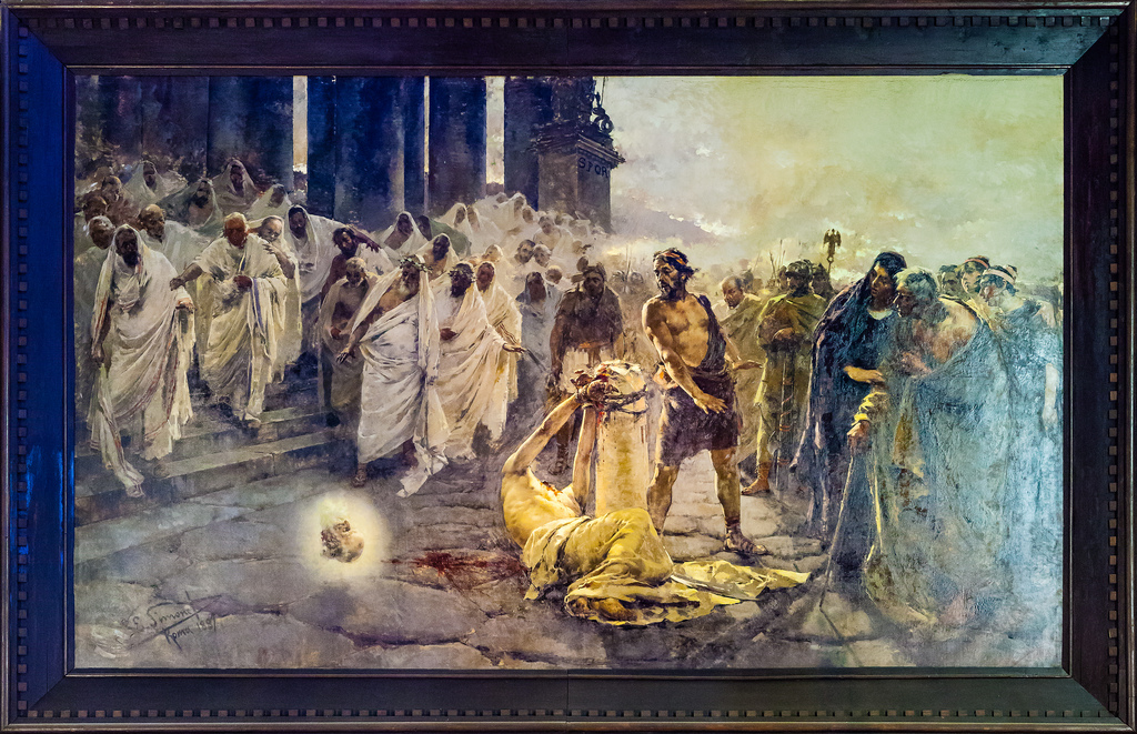 La obra representa la decapitación del apóstol San Pablo, llamado el Apóstol de los Gentiles, que según la tradición tuvo lugar en Roma durante la persecución contra los cristianos decretada por el emperador Nerón.